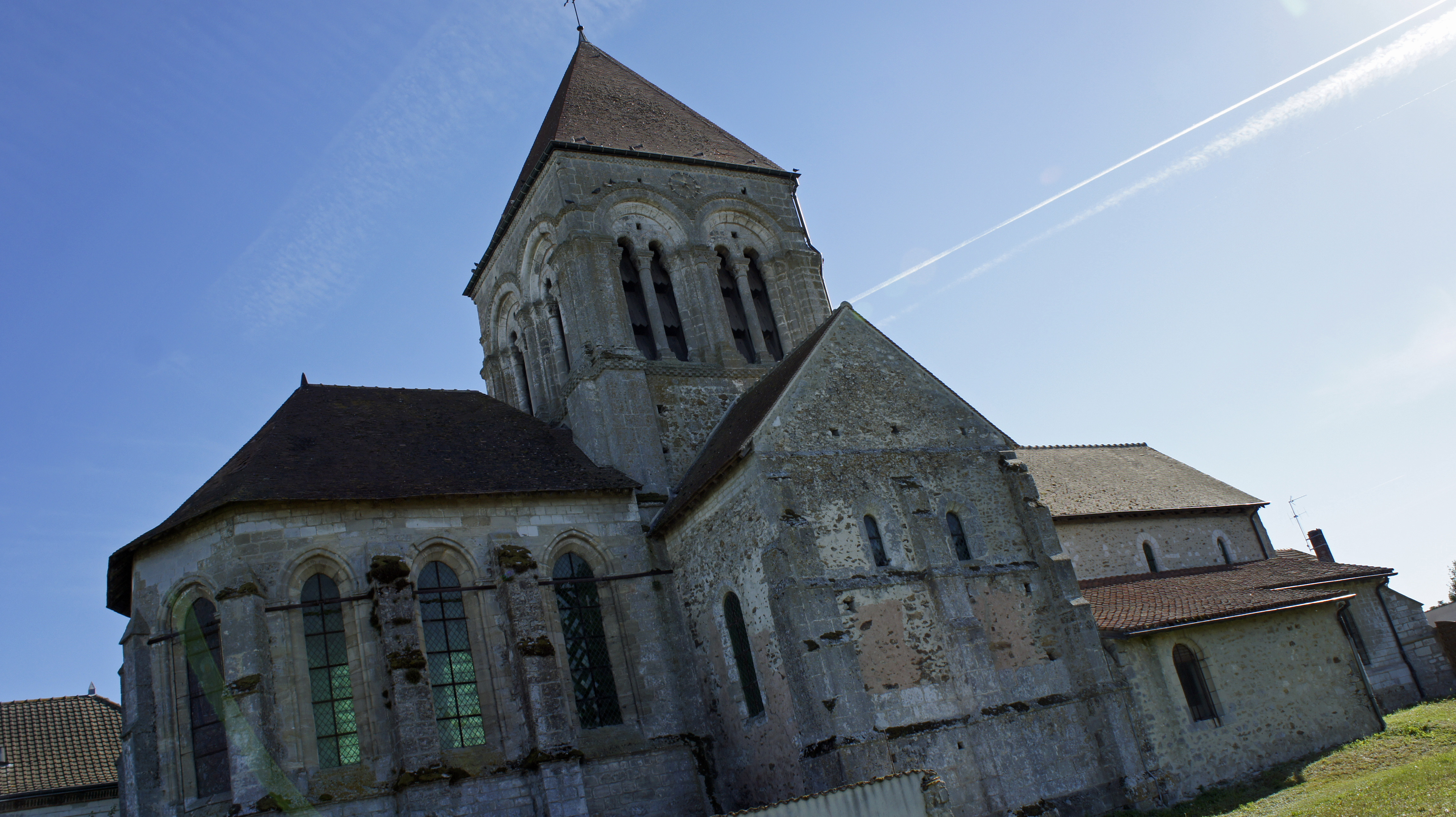 Vue de l'église de Thibie.